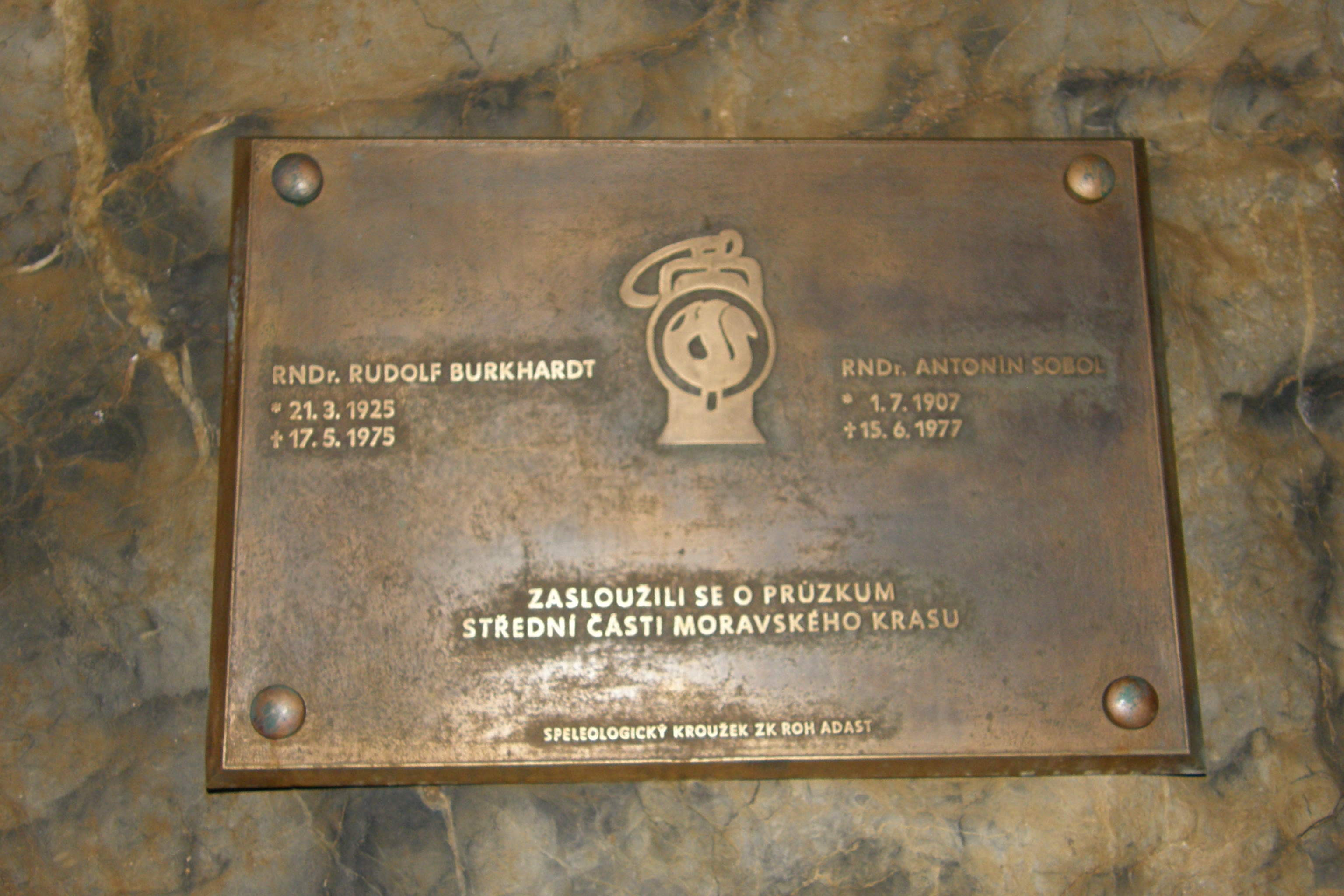 Býčí skála, pamětní deska speologům RNDr. Rudolfu Burkhardtovi a RNDr. Antonínu Sobolovi